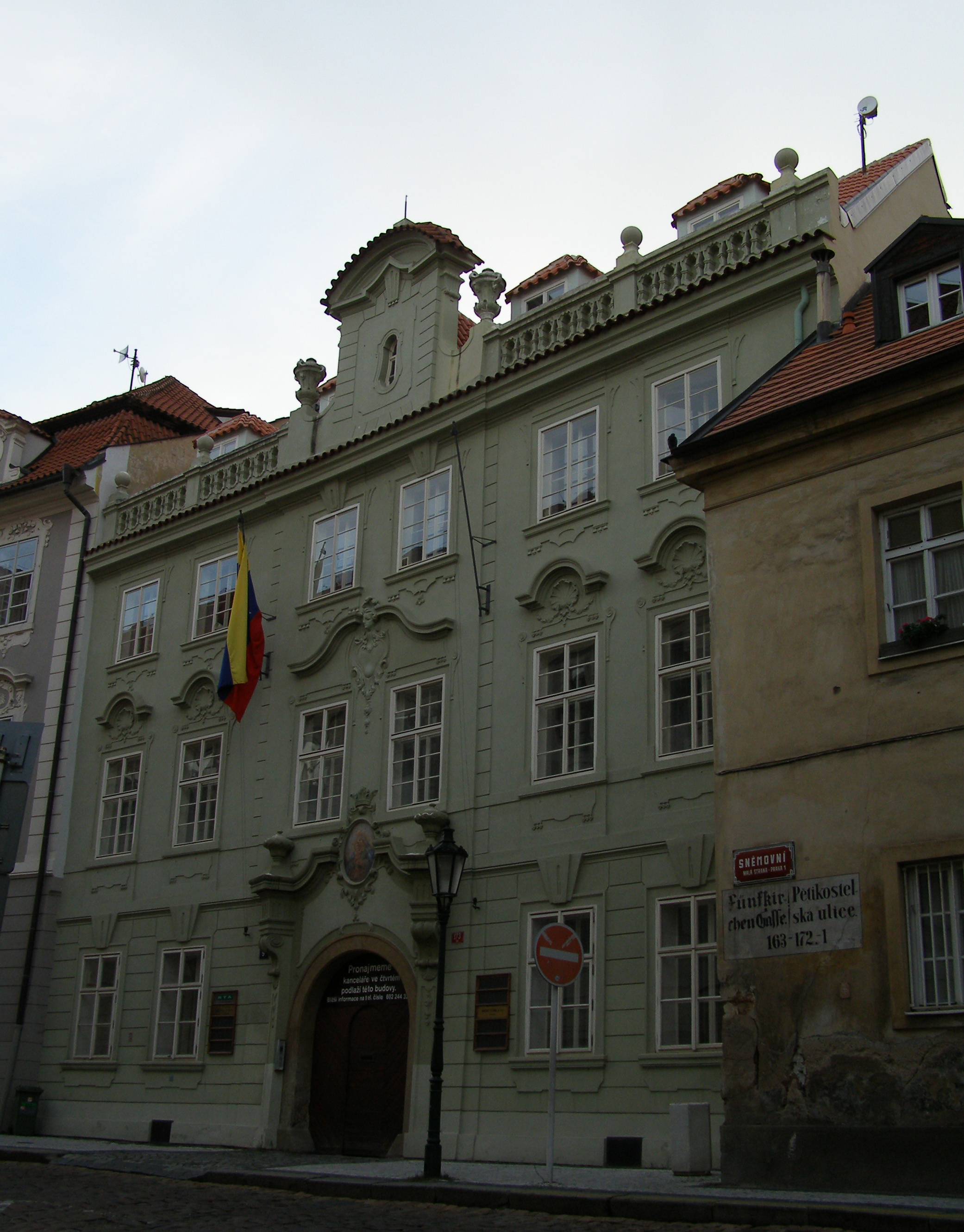 Měšťanský dům (Malá Strana), Praha 1, Sněmovní 173/9, Malá Strana